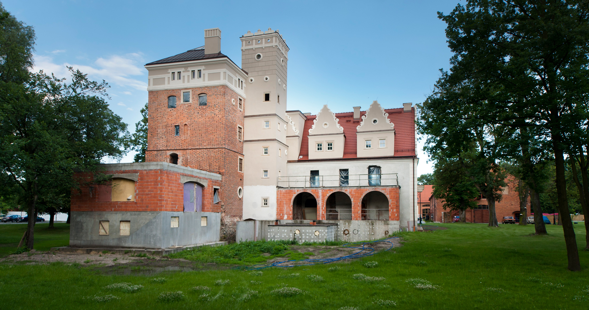 Dwór z wieżą mieszkalną- Oficyna mieszkalna I Ślęza, ul. Główna 12, Kobierzyce